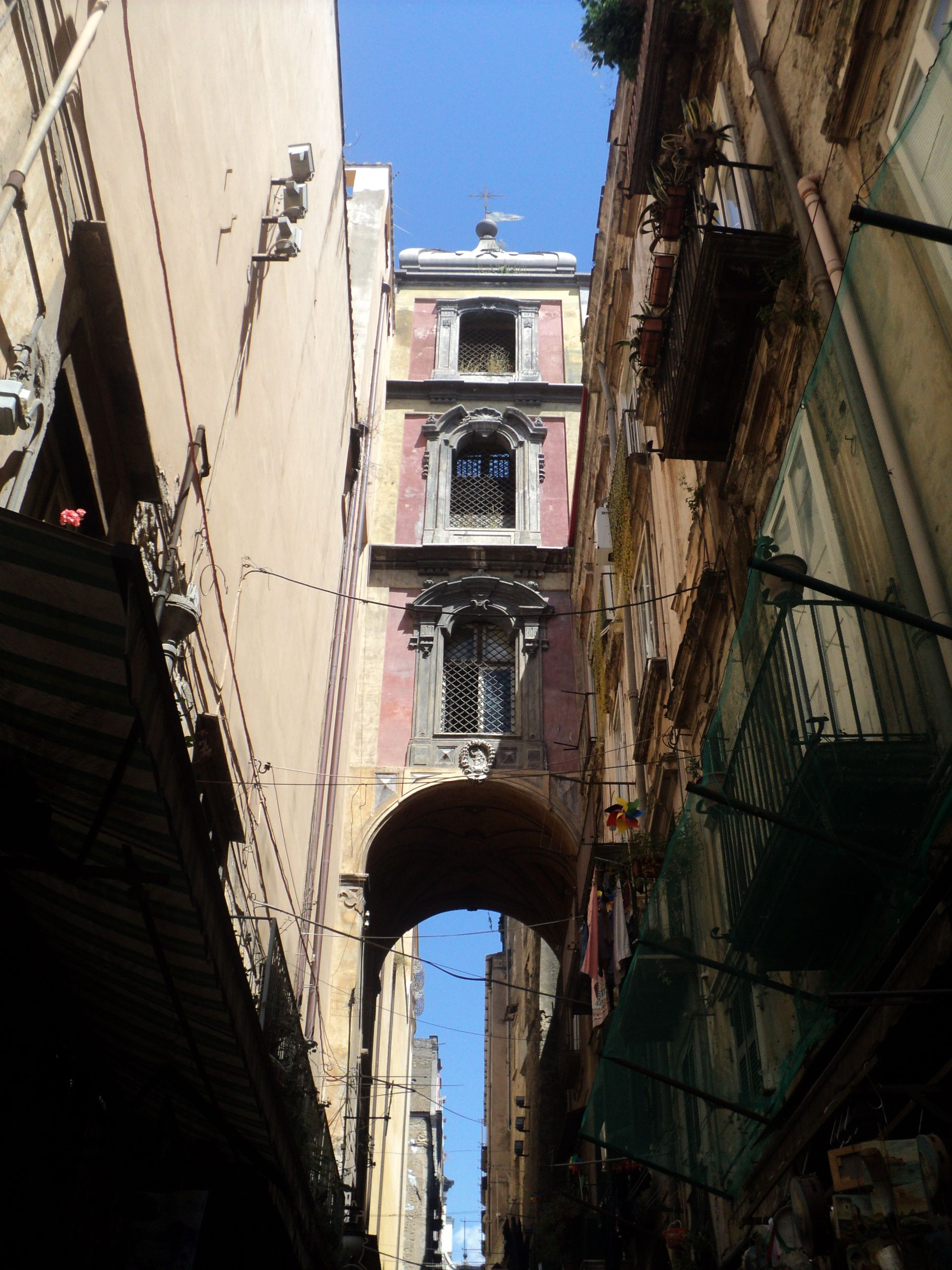 Campanile della Chiesa di San Gregorio Armeno (Napoli)